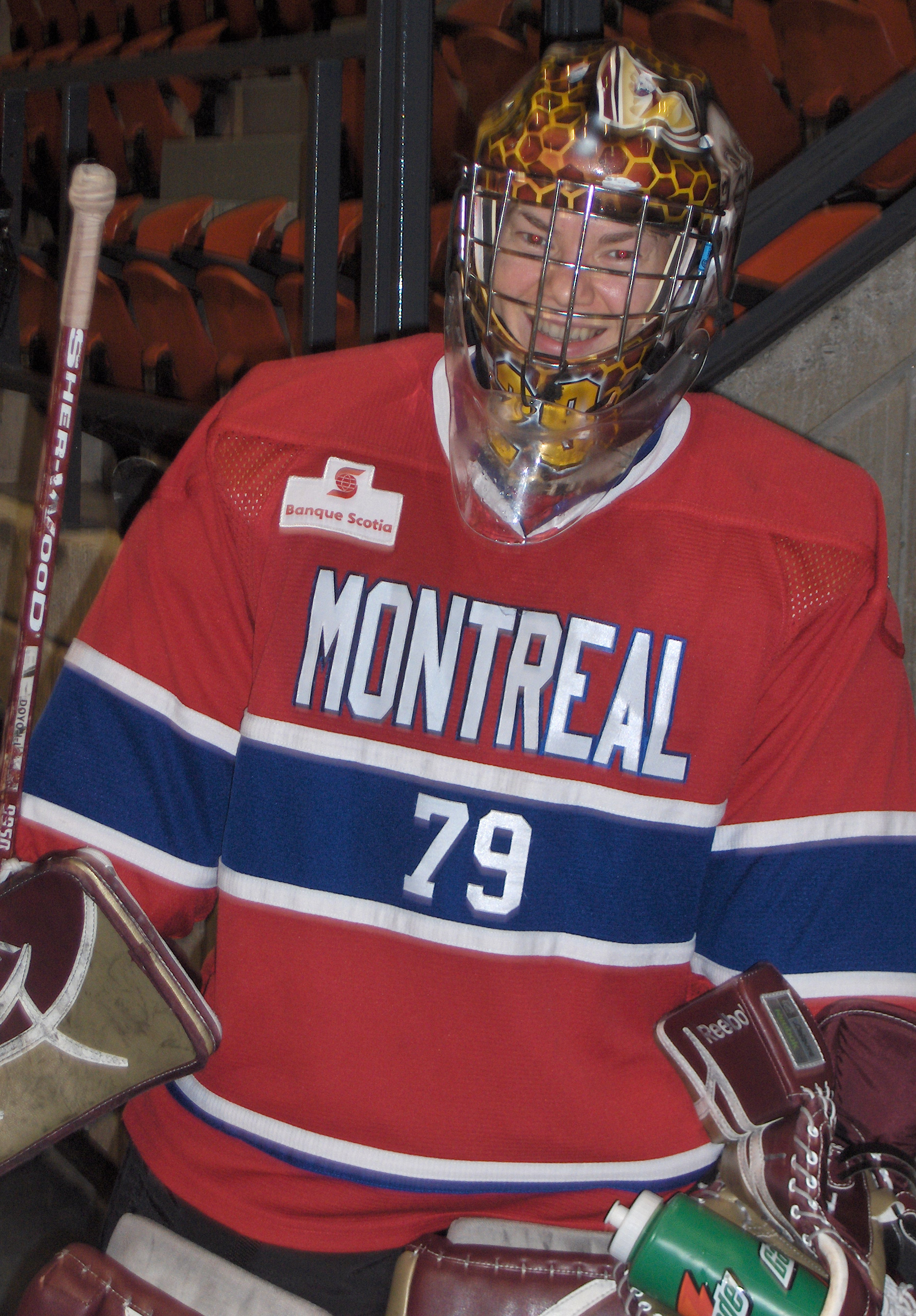 Joueuse des Stars